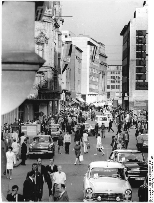 Leipzig, Grimmaische Straße Zentralbild Kluge 3.9.1970.Ill.-Leipzig: Herbstmesse 1970 Blick in die Grimmaische Straße und -im Hintergrund- der Karl-Marx-Platz.